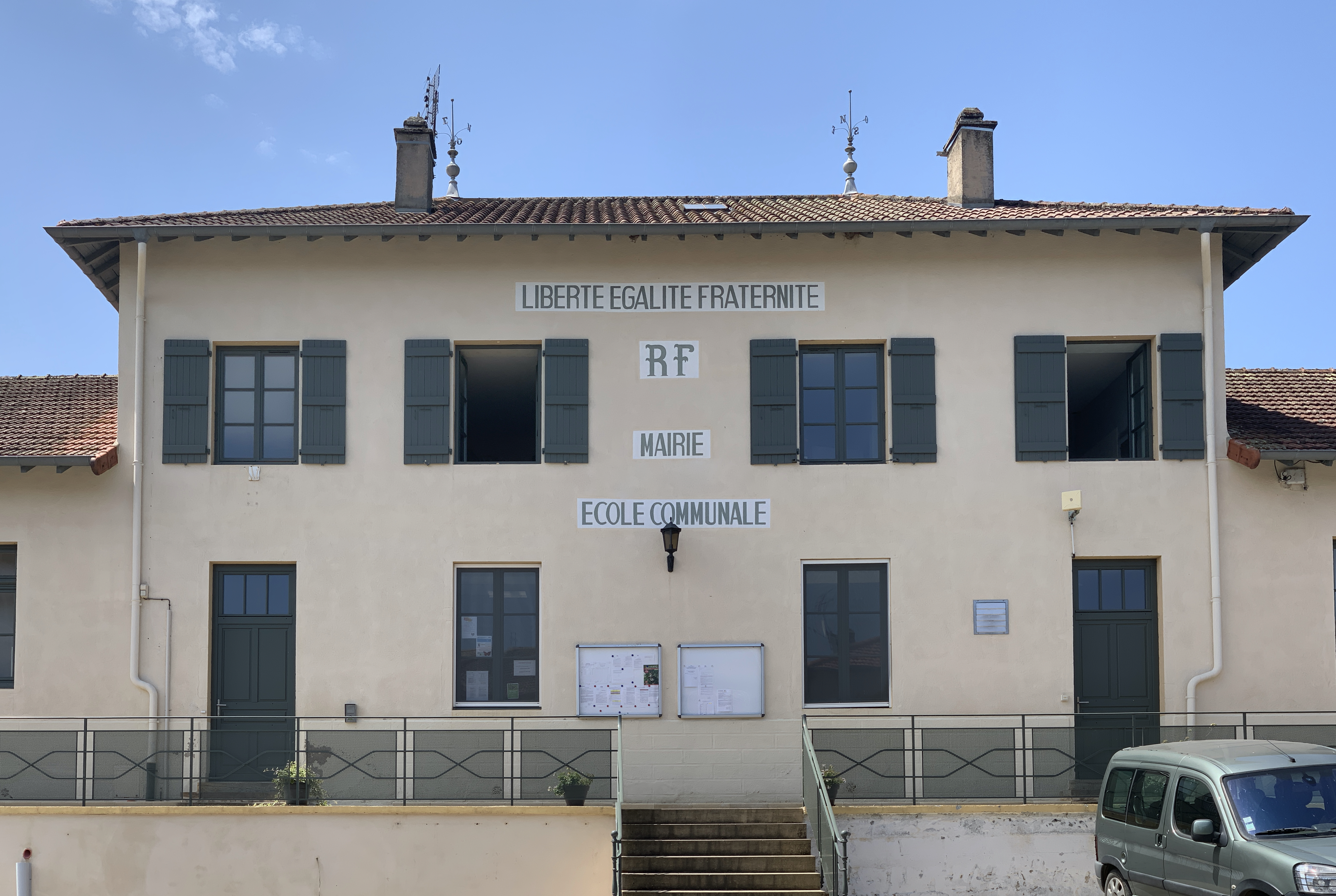 Mairie de Bergesserin.